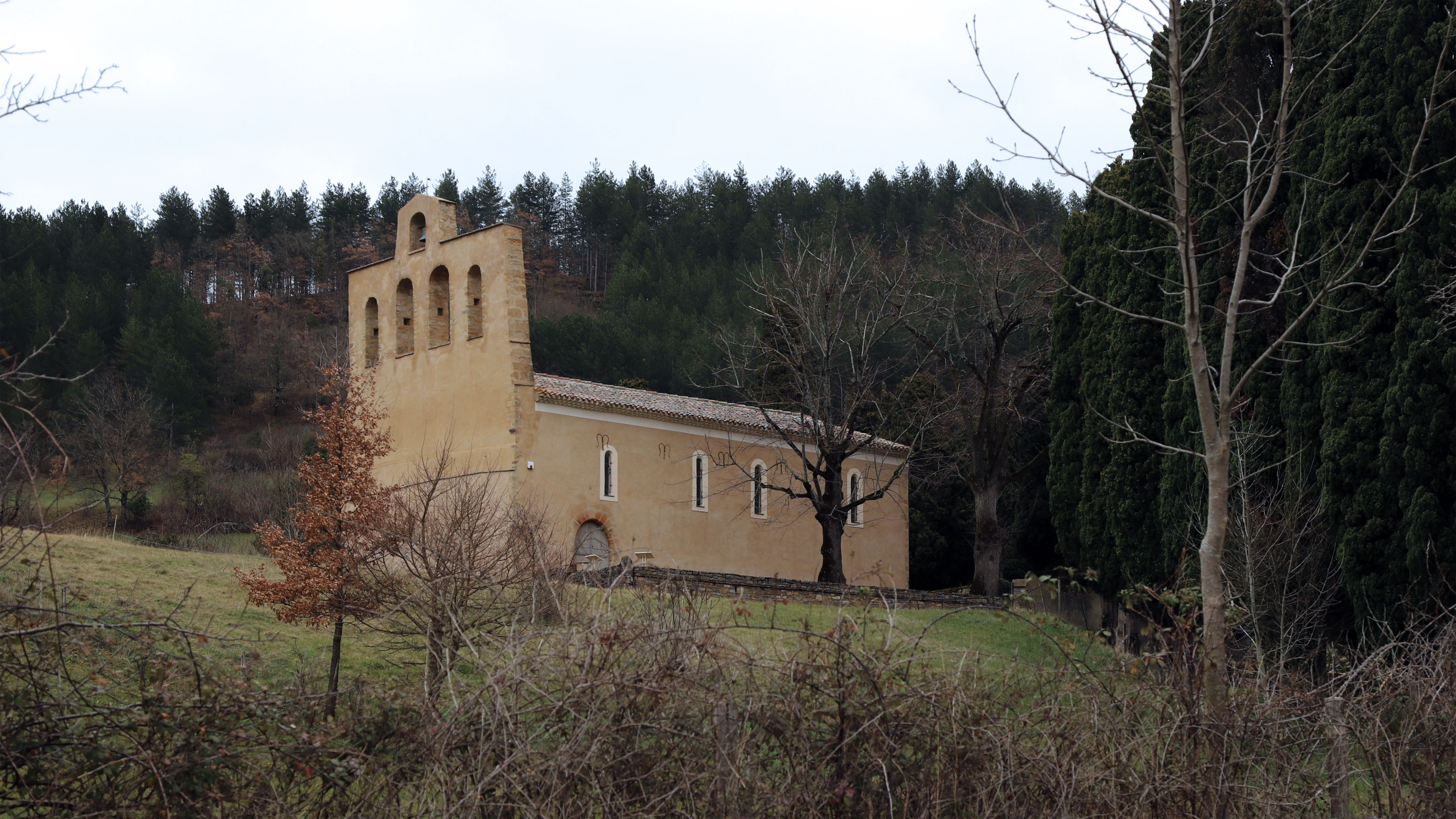 Chapelle